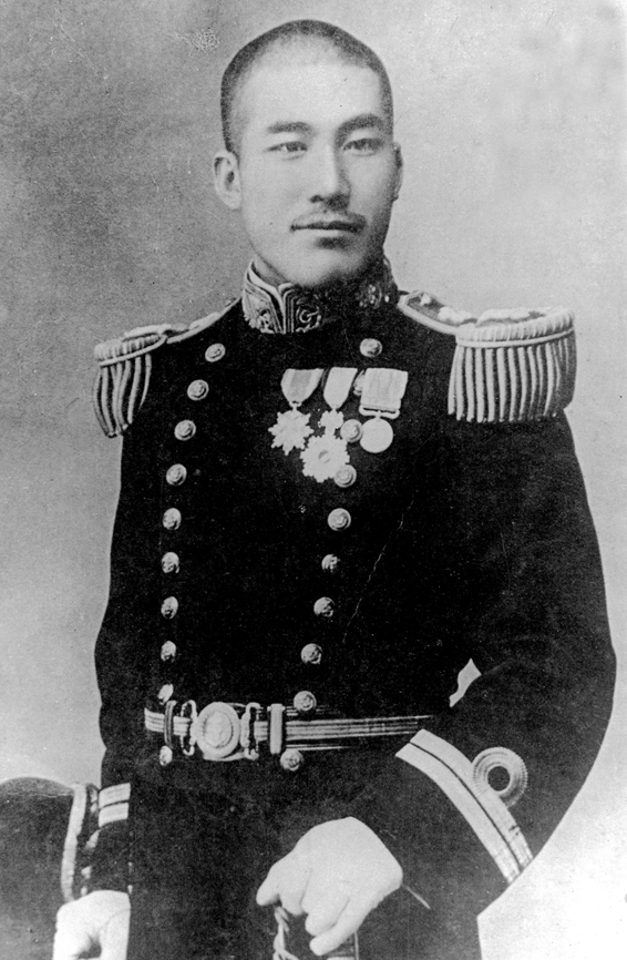 海軍大尉・佐久間 勉。Lieutenant Tsutomu Sakuma of the Imperial Japanese Navy.